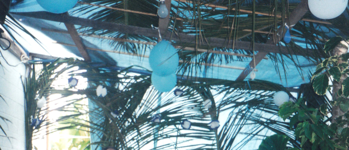 Le toit est formé à partir de choka et de bambou. On a ensuite lancé une bâche et disposé des feuilles de cocotiers pour recouvrir le tout.